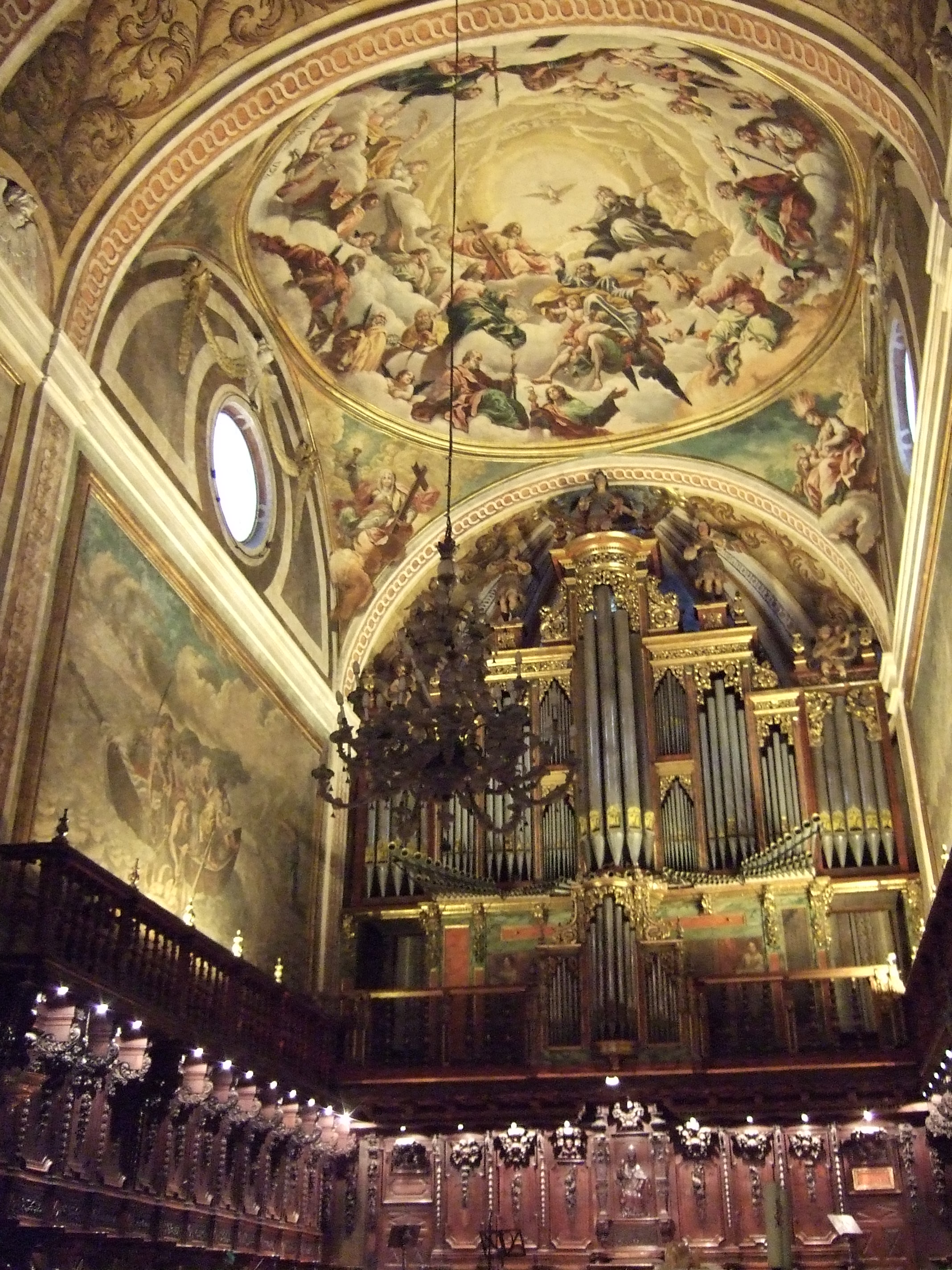 Jaca - Catedral - Interior - Coro